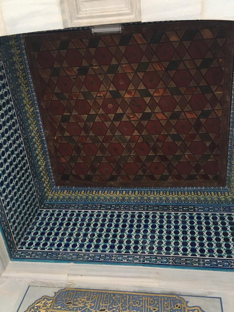 Son cemaat yerinin orta kısmında yer alan caminin giriş kapısı üzerindeki süslemeler